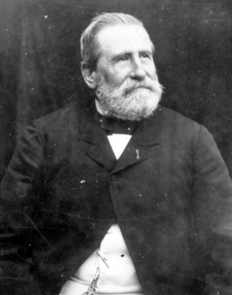 portrait de Gaston de saporta portrait